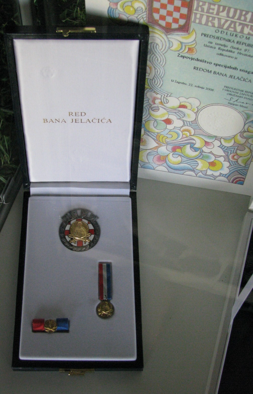 Red bana Jelačića s ispravom o dodjeli odlikovanja Zapovjedništvu specijalnih snaga MUP-a od 22. svibnja 2006